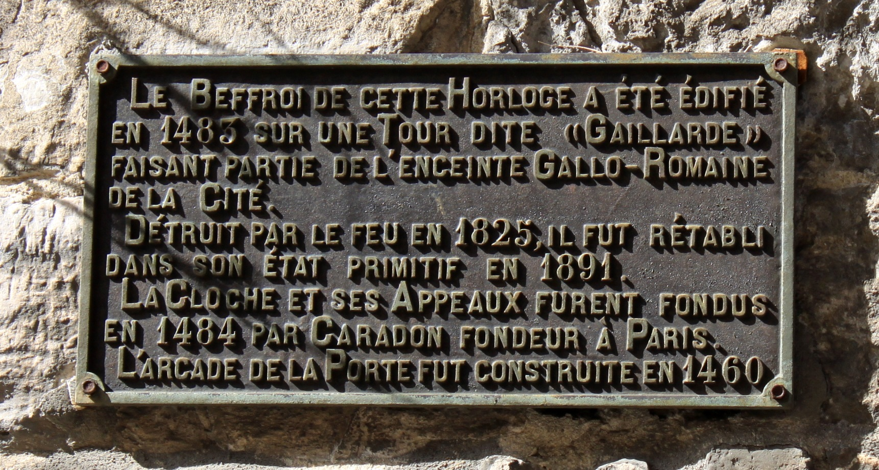 Auxerre, Yonne, Bourgogne, France